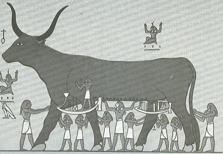 Nut, Noet